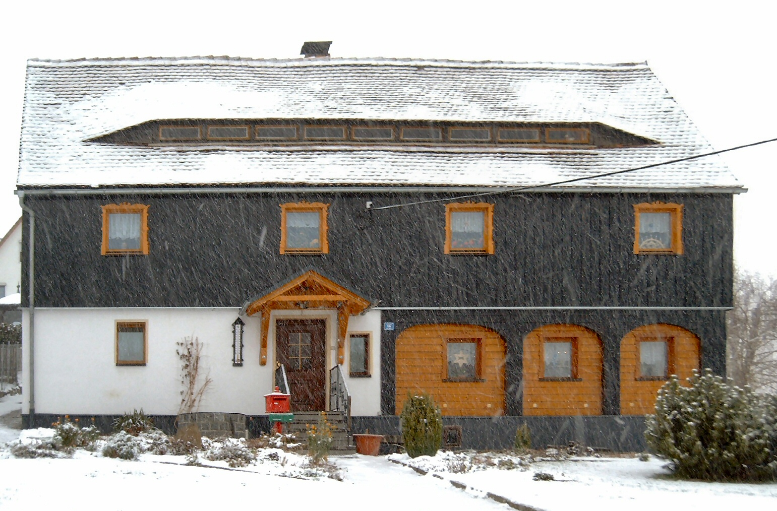 Umgebindehaus in Schirgiswalde an der Bauernstraße